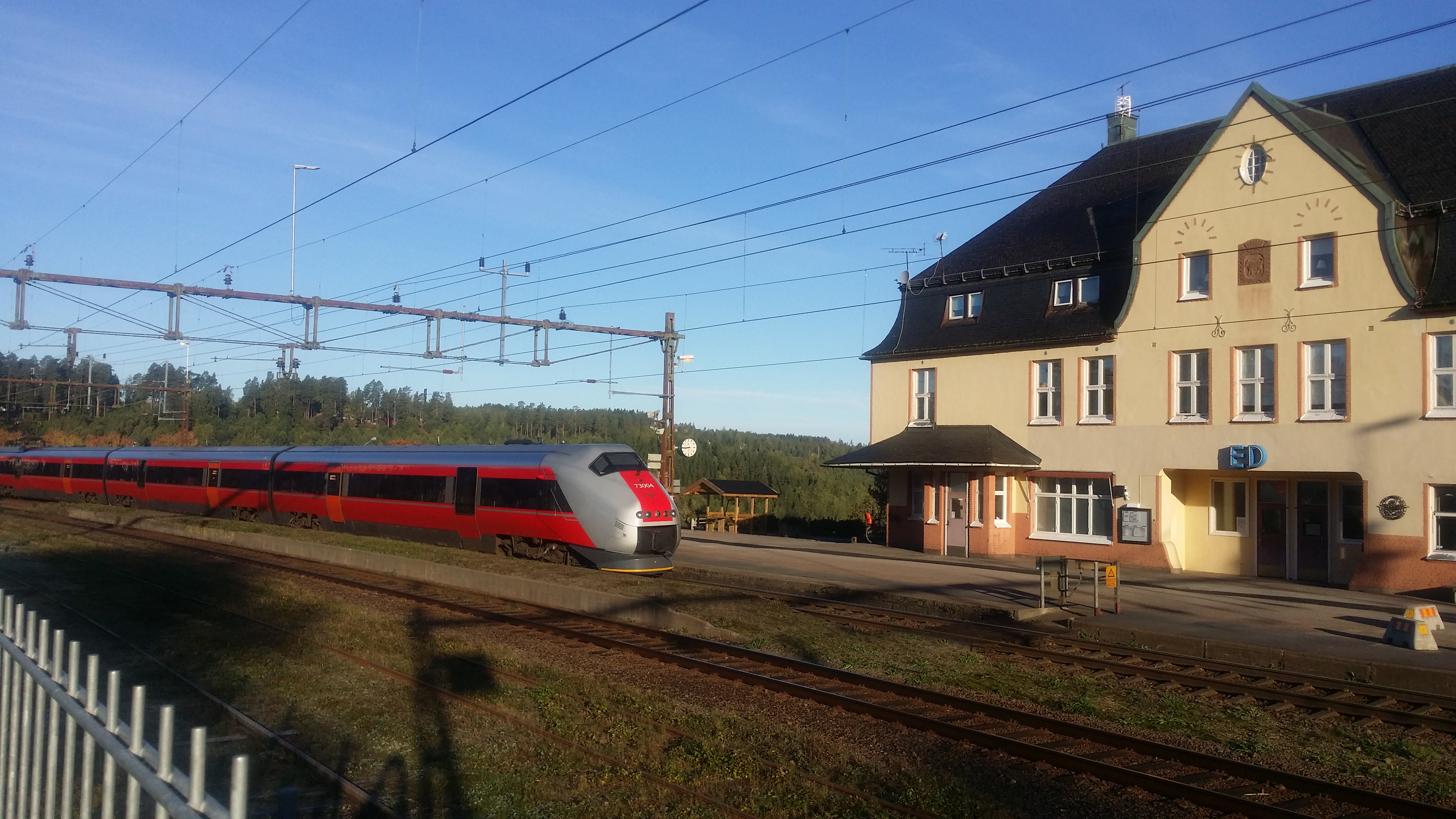 Ed stasjon og med norsk togsett tp. 73 Göteborg-Oslo.